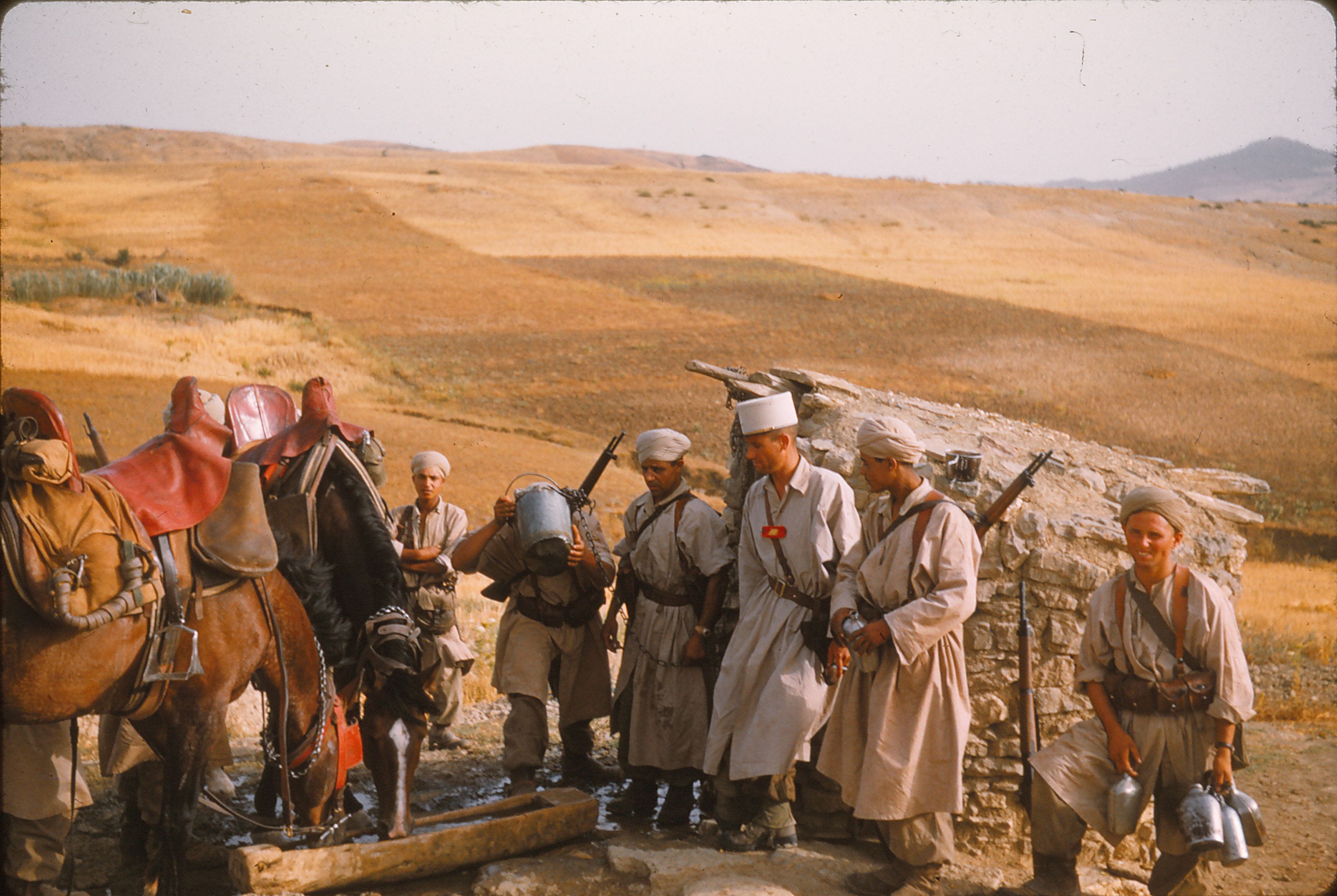 Rassemblement autour d'un abreuvoir et paysage typique.